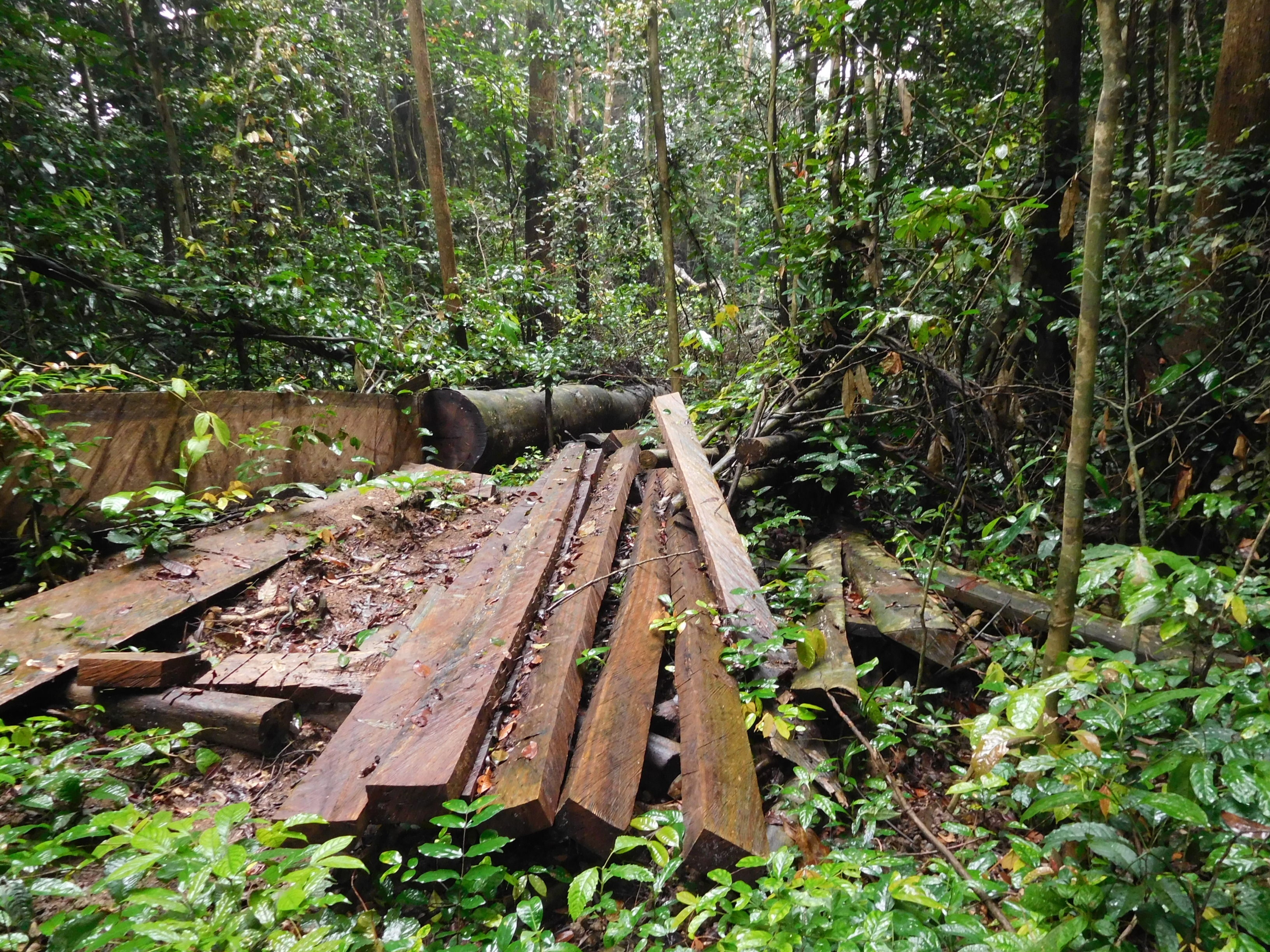 Abattage d'arbres (Tayap, Cameroun)